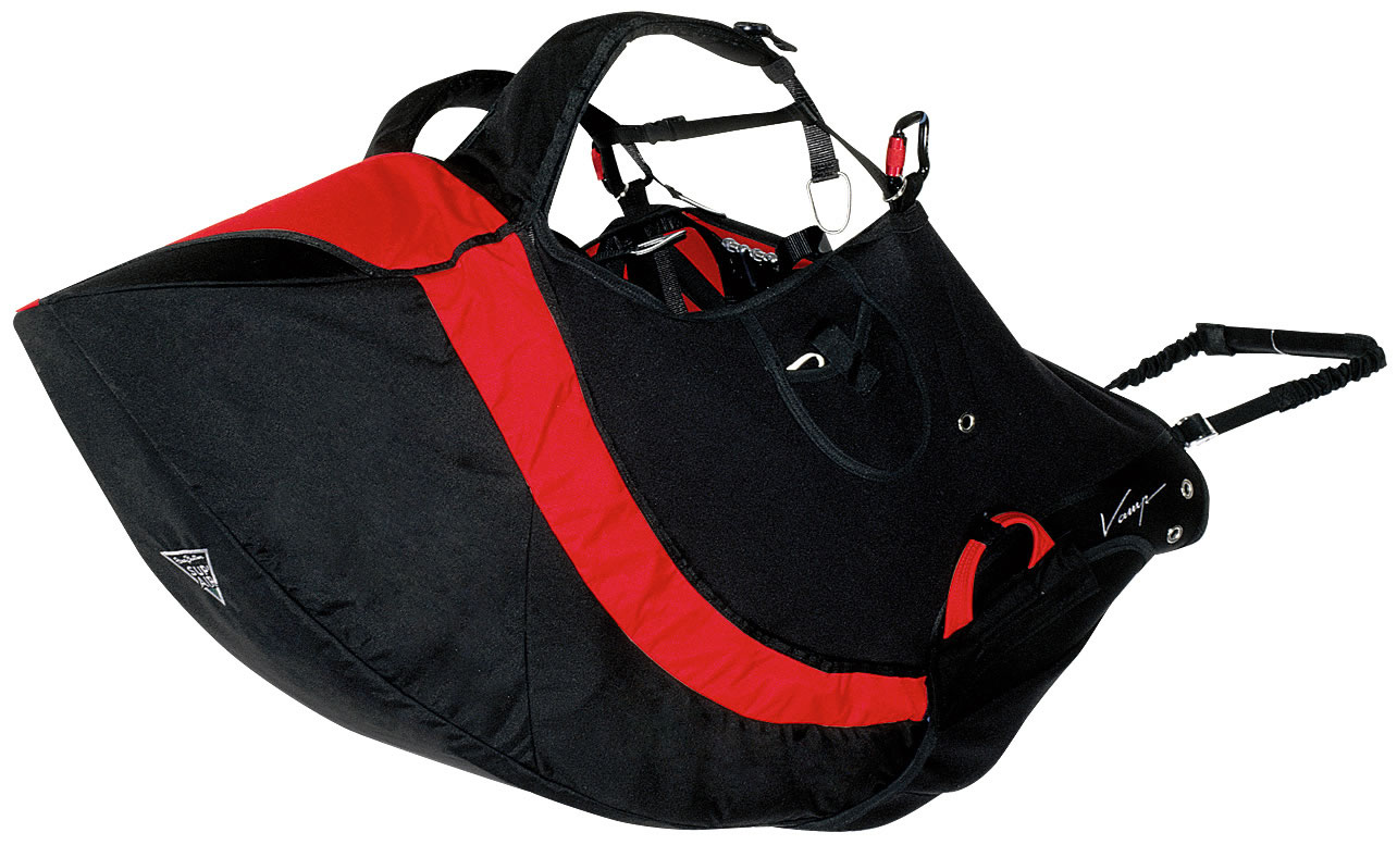 voir Utilisateur:FredB/Autorisation photos SUP'AIR